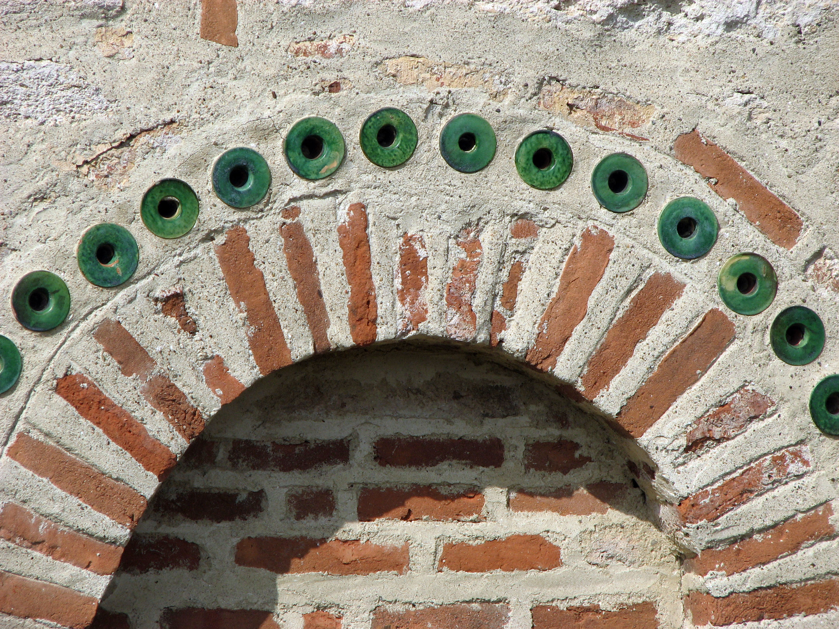 Делимично заштићена од пропадања, црква Вазнесења Господњег једино је што је остало од некадашњег Короглашког или Марковог манастира. Налази се поред села Милошево, на мање од десет километара од Неготина. Прошлост је обавијена многим тајнама, сачувана у легендама и предањима, али историјских података скоро и нема. По једном предању манастир је основао цар Душан, по другом царица Јелена, а по трећем је подигнут на месту где се упокојио Марко Краљевић, после битке на Ровинама. Истраживачи сматрају да је основан у доба краља Милутина. Мало је сачувано од живописа, који је био веома вредан. Црква је стављена под кров да би се спречило пропадање и чека даљу обнову.